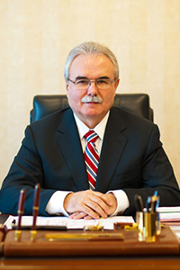 Omul politic Gheorghe Seculici